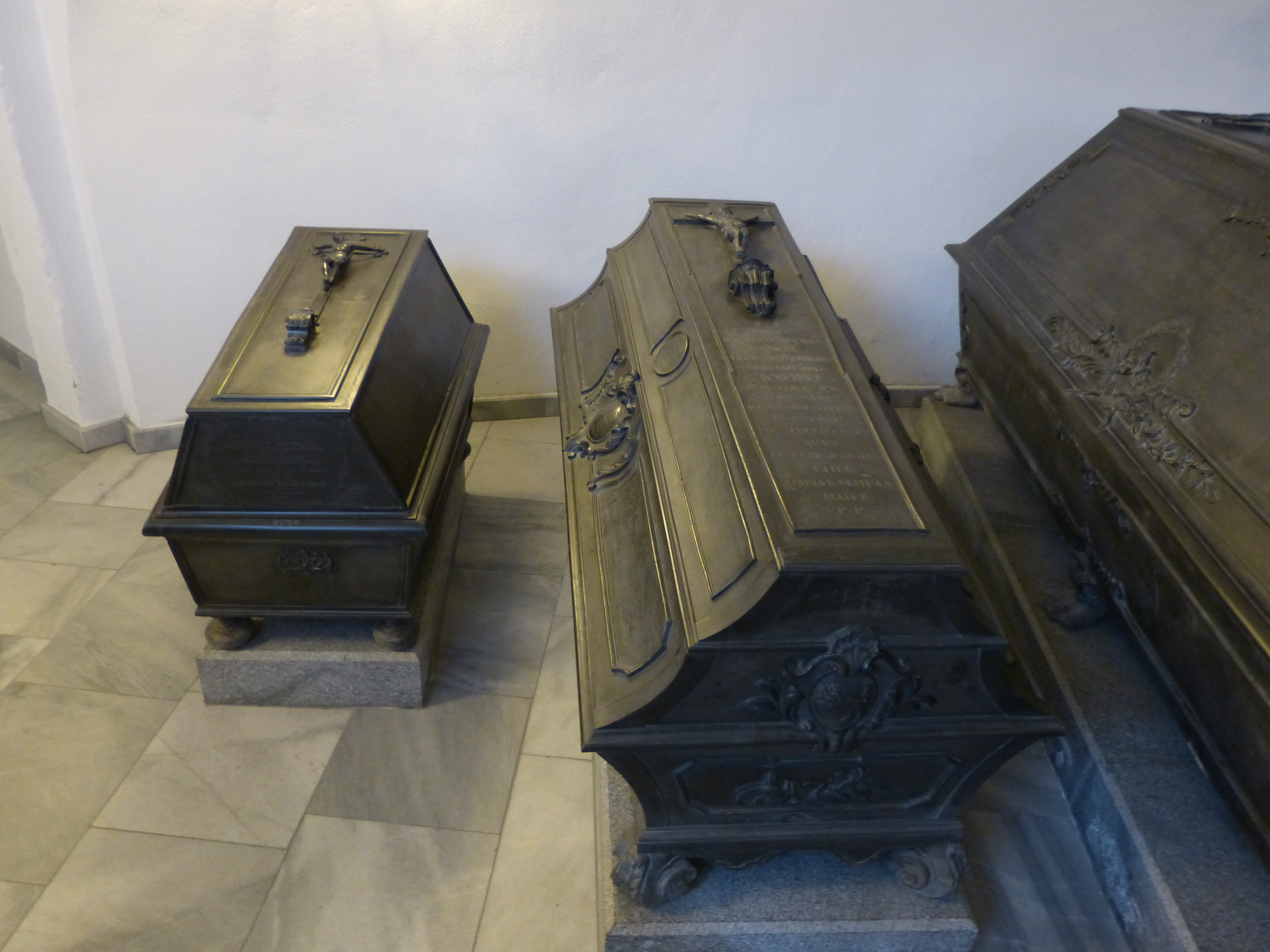 Stiftergruft der Wettiner-Gruft der Katholischen Hofkirche in Dresden, Sachsen